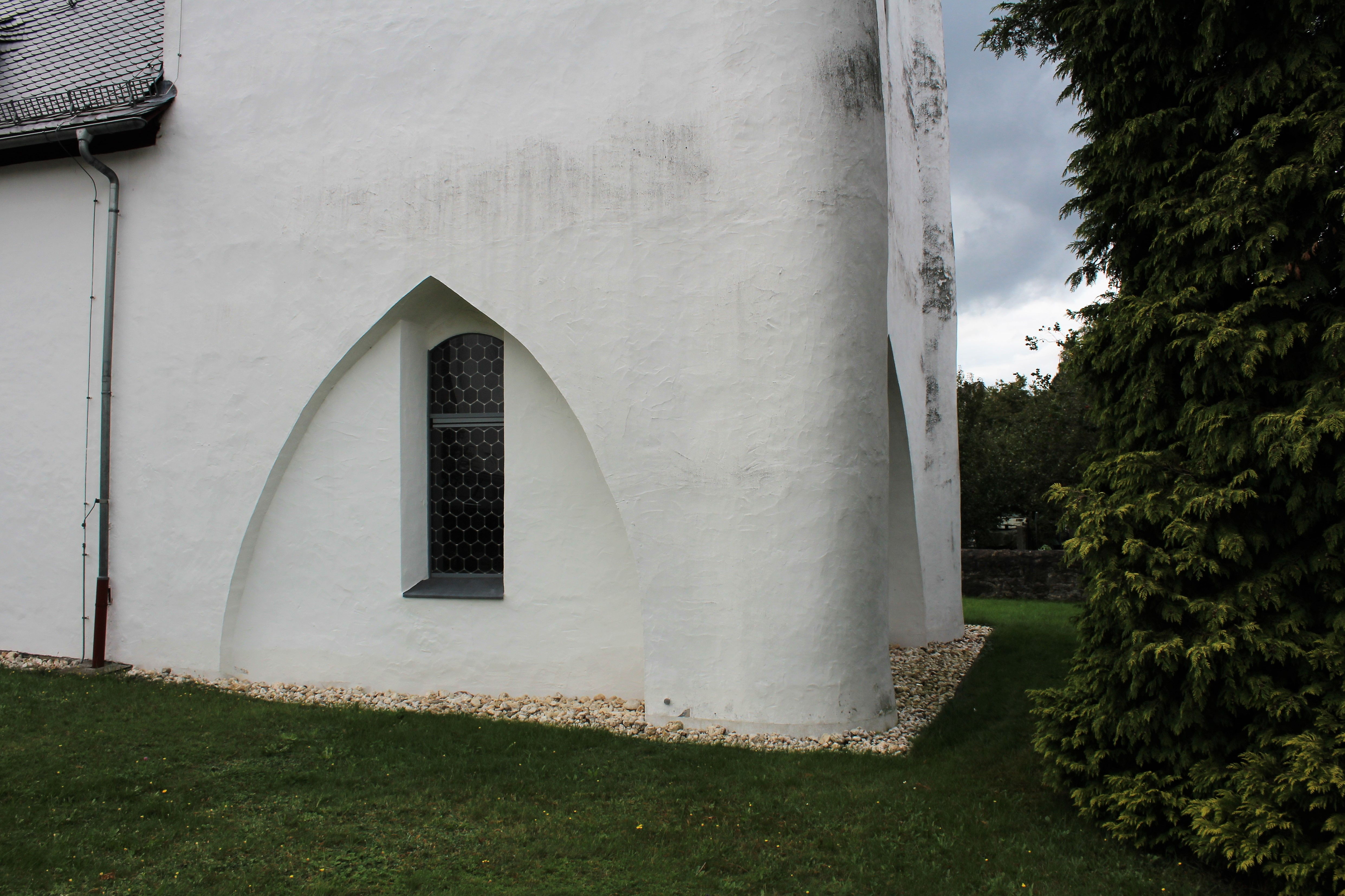 Evangelische Kirche Daubhausen, Lahn-Dill-Kreis, Hessen, Deutschland